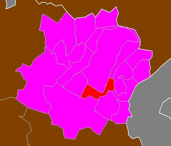 Maps of arrondissements and cantons of France: Arrondissement de Saint-Germain-en-Laye - Canton du Pecq.PNG (Département des Yvelines, Arrondissement de Saint-Germain-en-Laye)